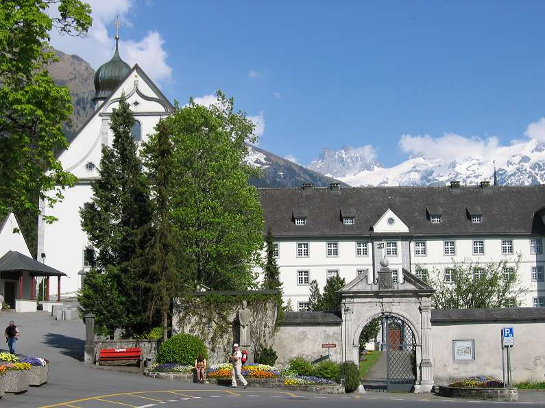 Kloster Engelberg Fotografiert von Mussklprozz am 29. Mai 2004 GNU-FDL